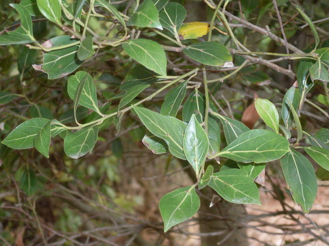 Cryptocarya foveolata, leaves